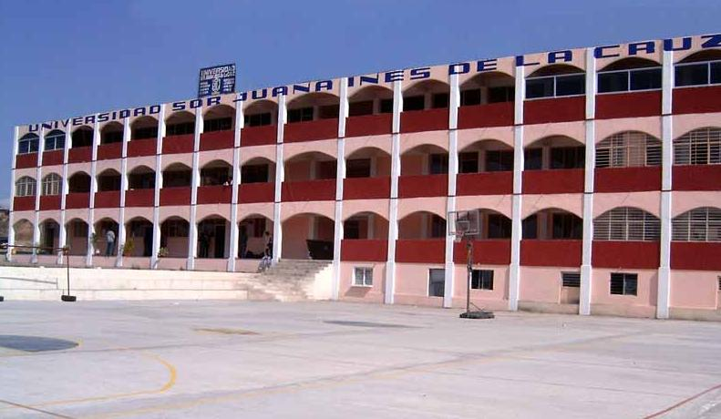 Universidad Sor Juana Inés de la Cruz en Uriangato